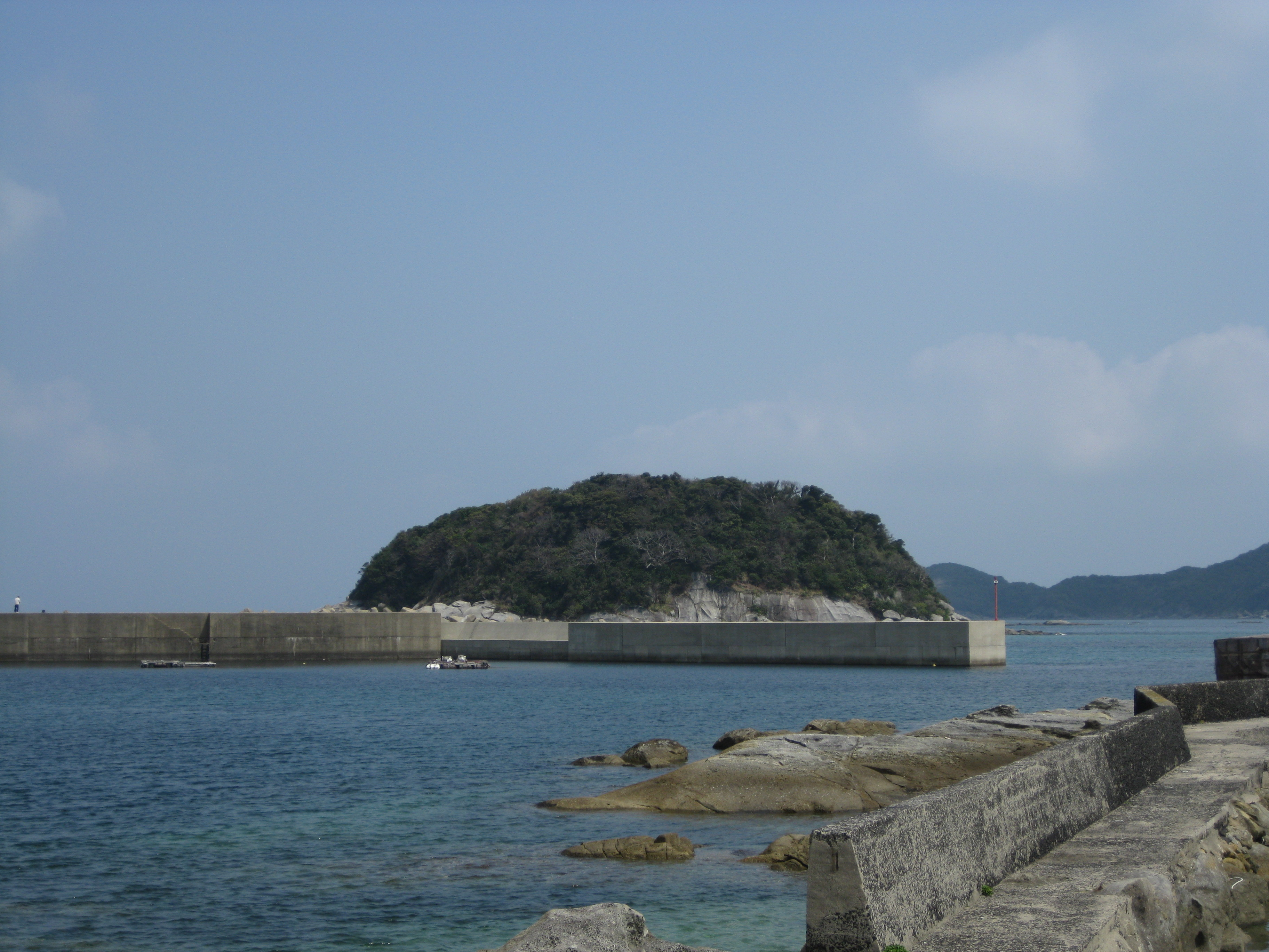 有川御小島